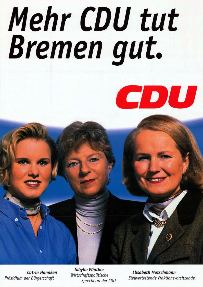 Mehr CDU tut Bremen gut. CDU Catrin Hannken Präsidium der Bürgerschaft Sibylle Winther Wirtschaftspolitische Sprecherin der CDU Elisabeth Motschmann Stellvertretende FraktionsvorsitzendeAbbildung:PorträtfotosKommentar:Aufkleber "Frauen" auf der Rückseite.Plakatart:Kandidaten-/Personenplakat mit PorträtObjekt-Signatur:10-005 : 1002Bestand:Plakate zu Bürgerschaftswahlen Bremen (10-005)GliederungBestand10-18:Plakate zu Bürgerschaftswahlen Bremen (10-005) » CDULizenz:KAS/ACDP 10-005 : 1002 CC-BY-SA 3.0 DE